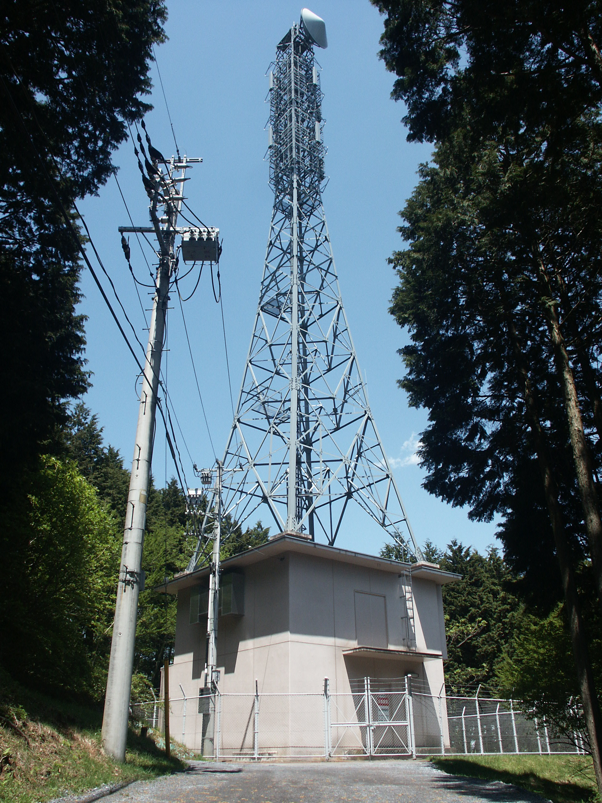 埼玉県ときがわ町の飯盛峠にあるナックファイブの送信所